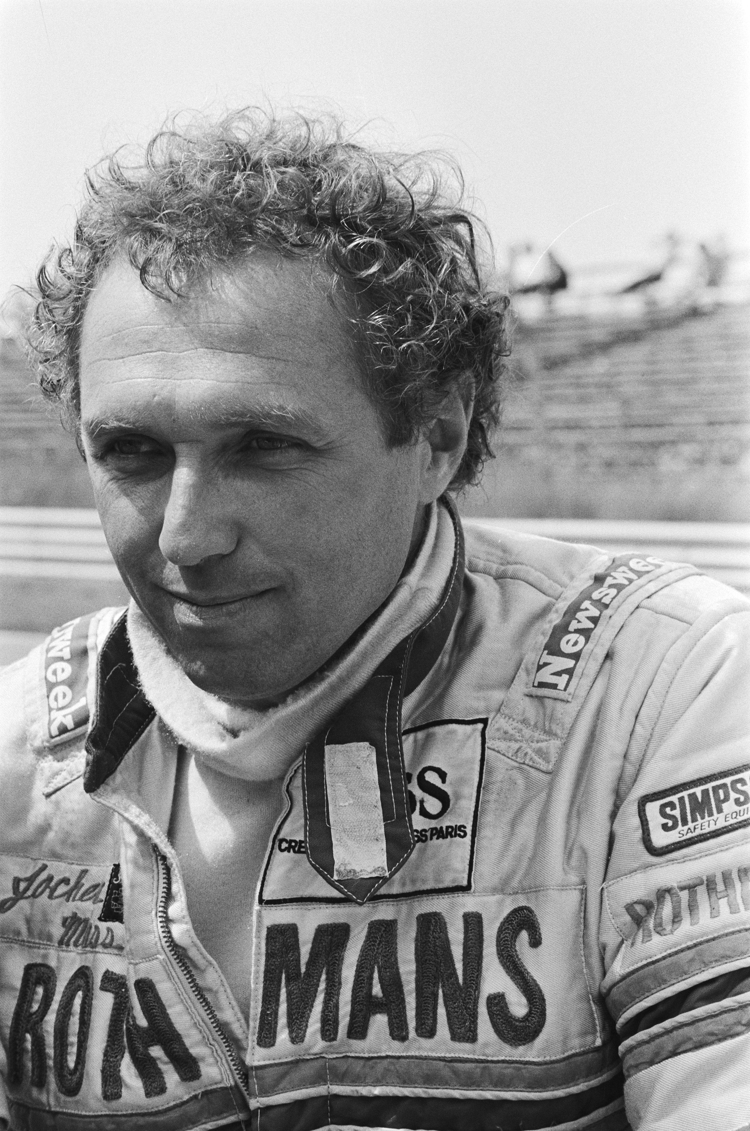 Grand Pris van Nederland te Zandvoort; koppen coureurs, Jochen Mass.